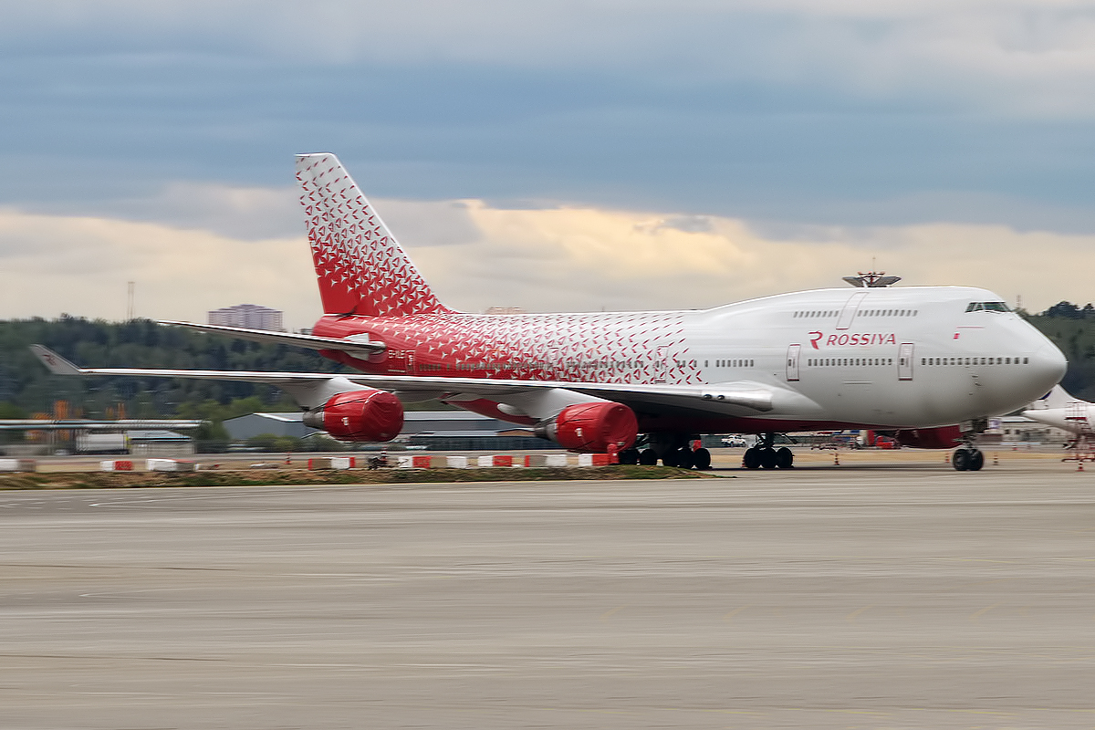 Rossiya, EI-XLE, Boeing 747-446